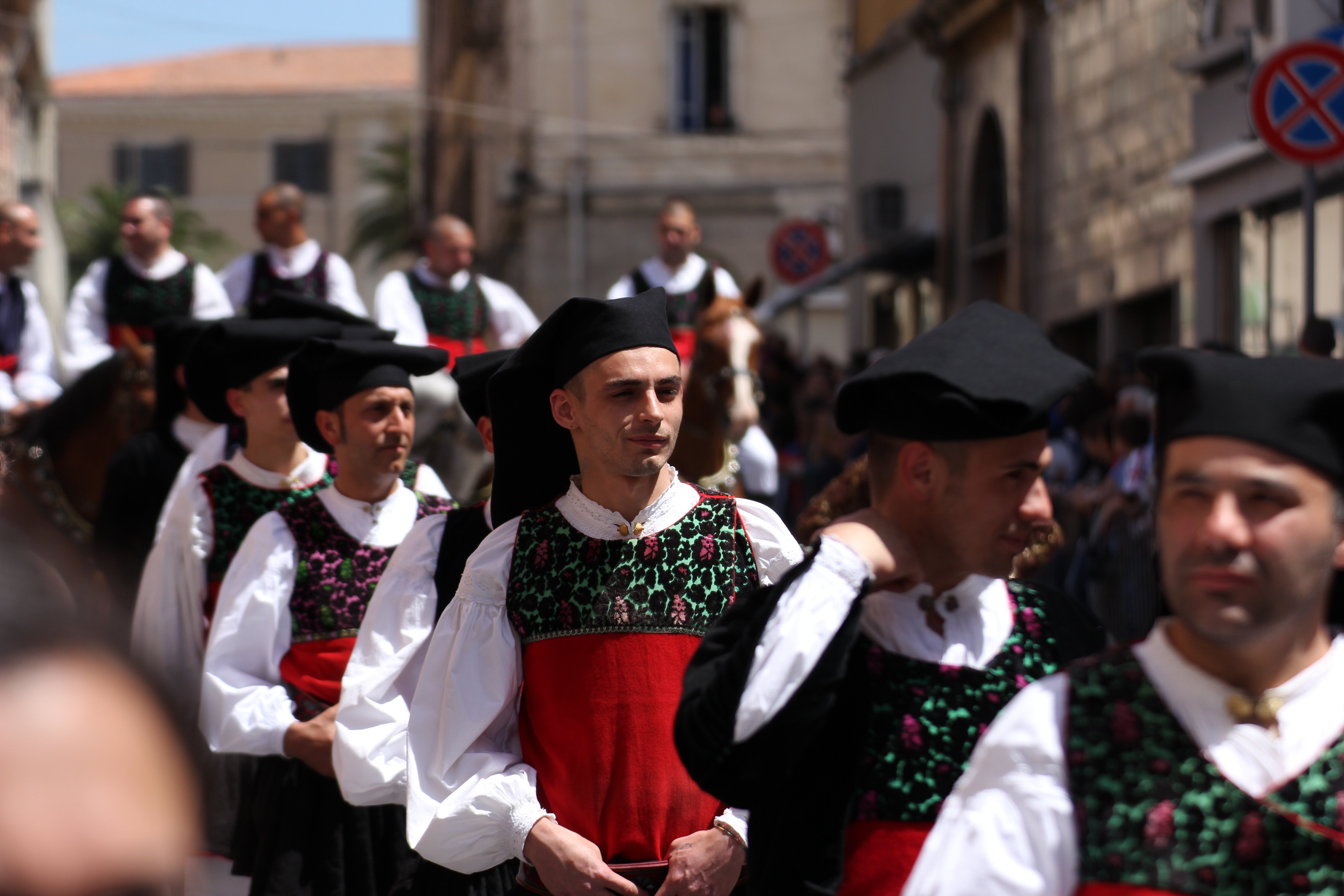 Costume tradizionale